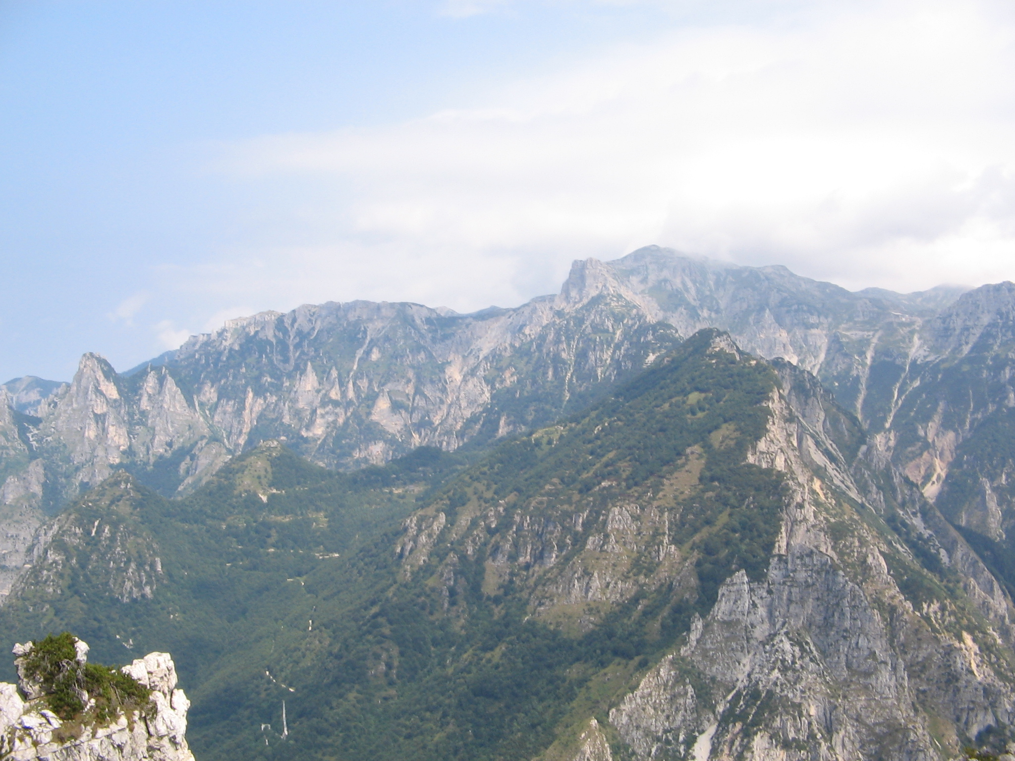 Pasubio, val di Fieno e val Canale